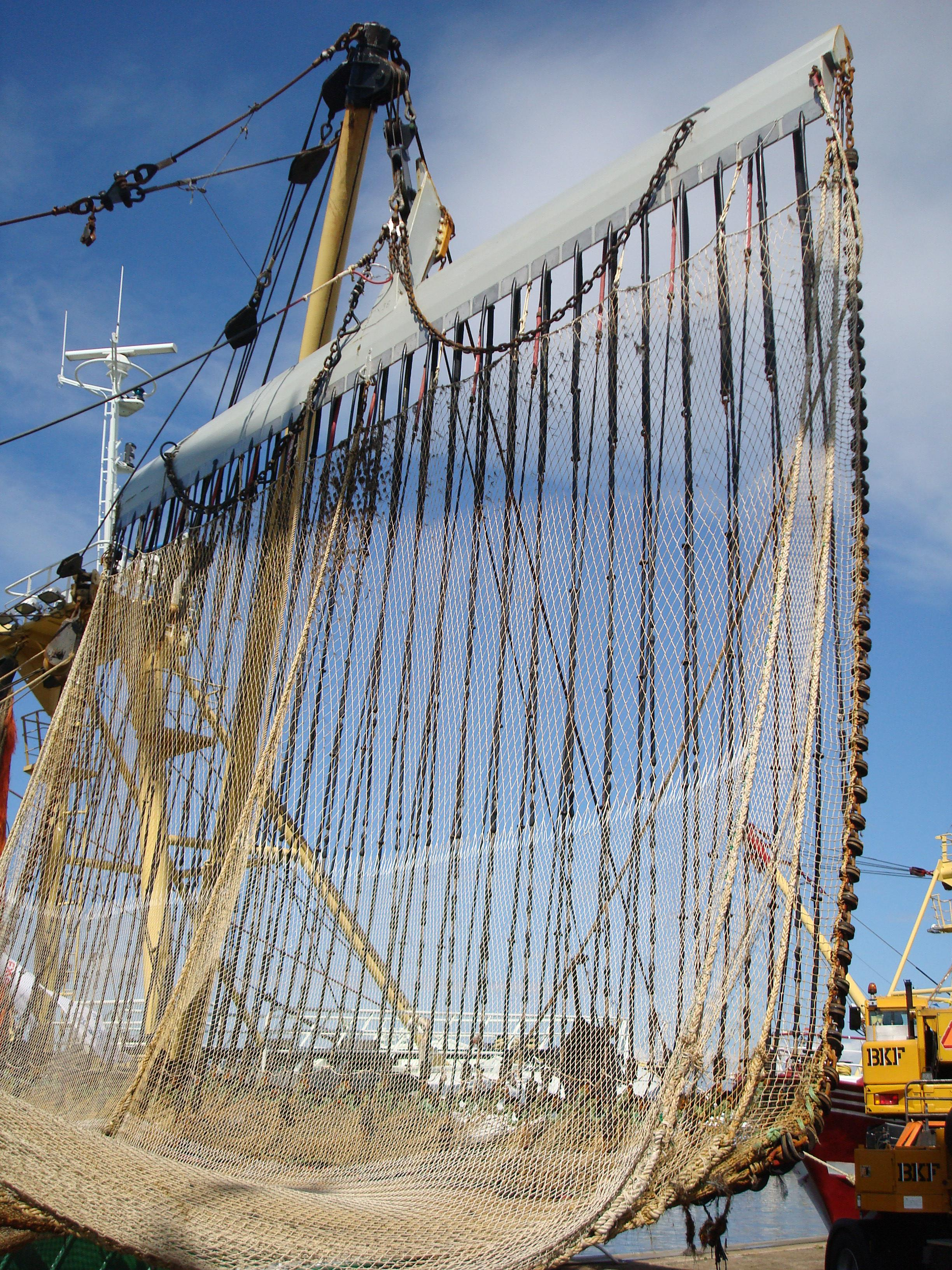 Een pulstuig voorzien van een Sumwing. De elektrodes hangen in de sleeprichting van het tuig en veroorzaken een licht elektrisch veld op de bodem, waardoor de platvis opschrikt van de bodem en in het net terecht komt.